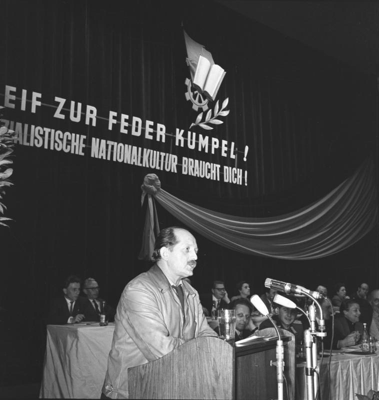 Zentralbild / Schmidt, 24.4.1959 Autorenkonferenz des Mitteldeutschen Verlages in Bitterfeld Unter der Losung "Greif zur Feder Kumpel, die sozialistische Nationalkultur braucht dich" wurde am 24.4.1959 im Kulturpalast des EKB Bitterfeld eine Autorenkonferenz des Mitteldeutschen Verlages Halle eröffnet. An ihr nahmen fast 300 "schreibende Arbeiter" und etwas 150 Schriftsteller aus der DDR teil. UBz: Der Schriftsteller Erwin Strittmatter spricht zur Diskussion.